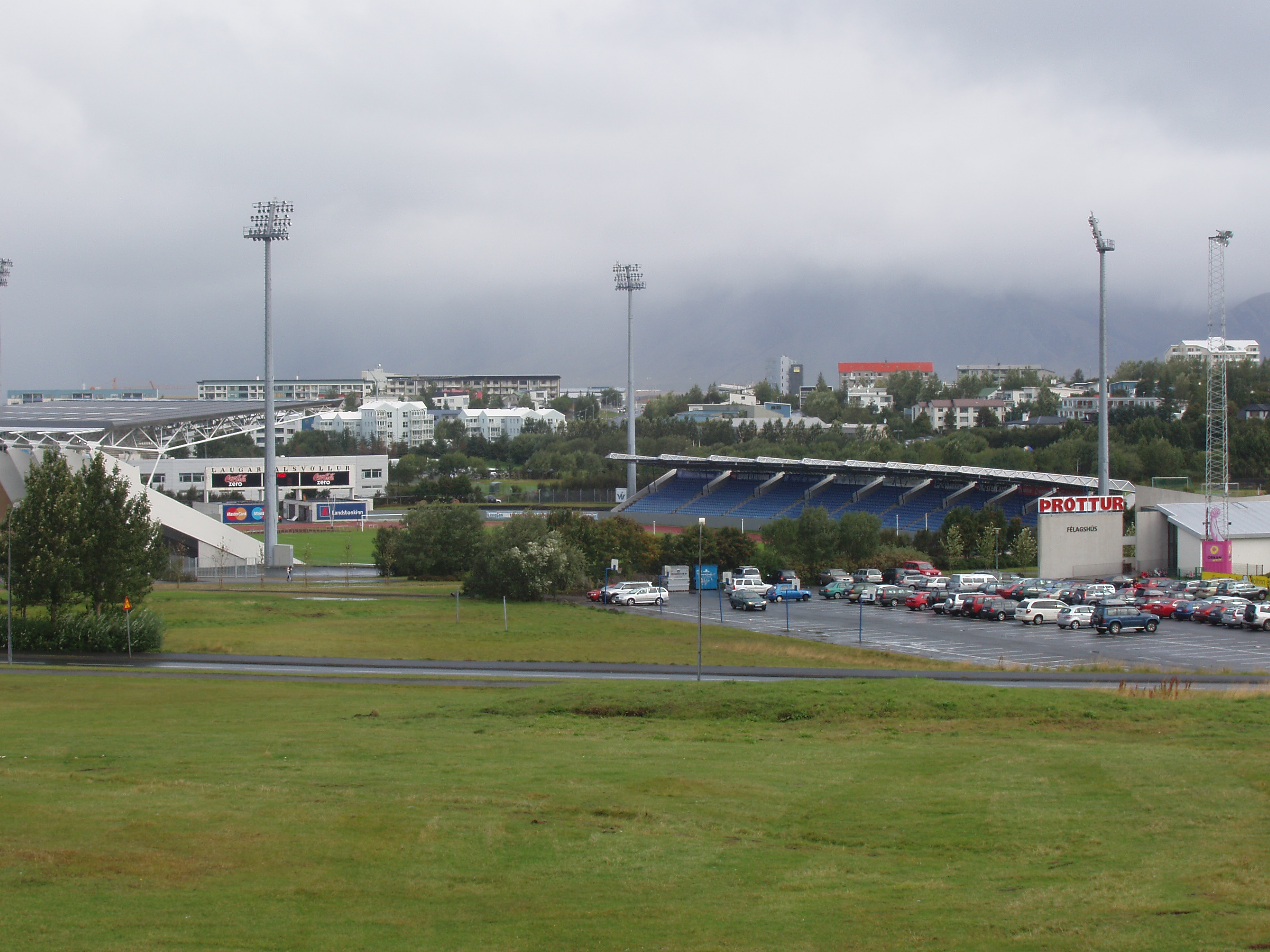 View over Laugardalsvollur